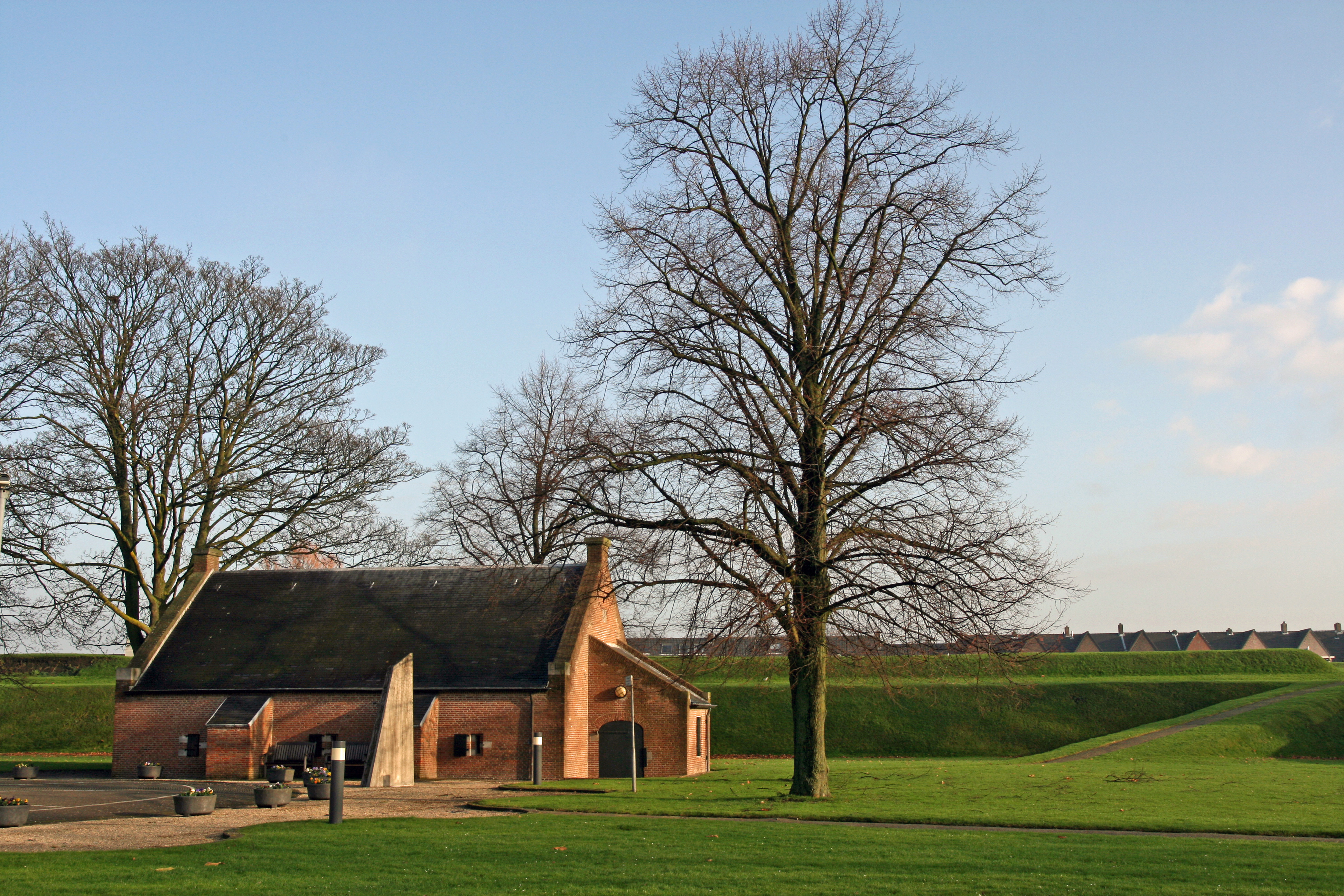 Citadel